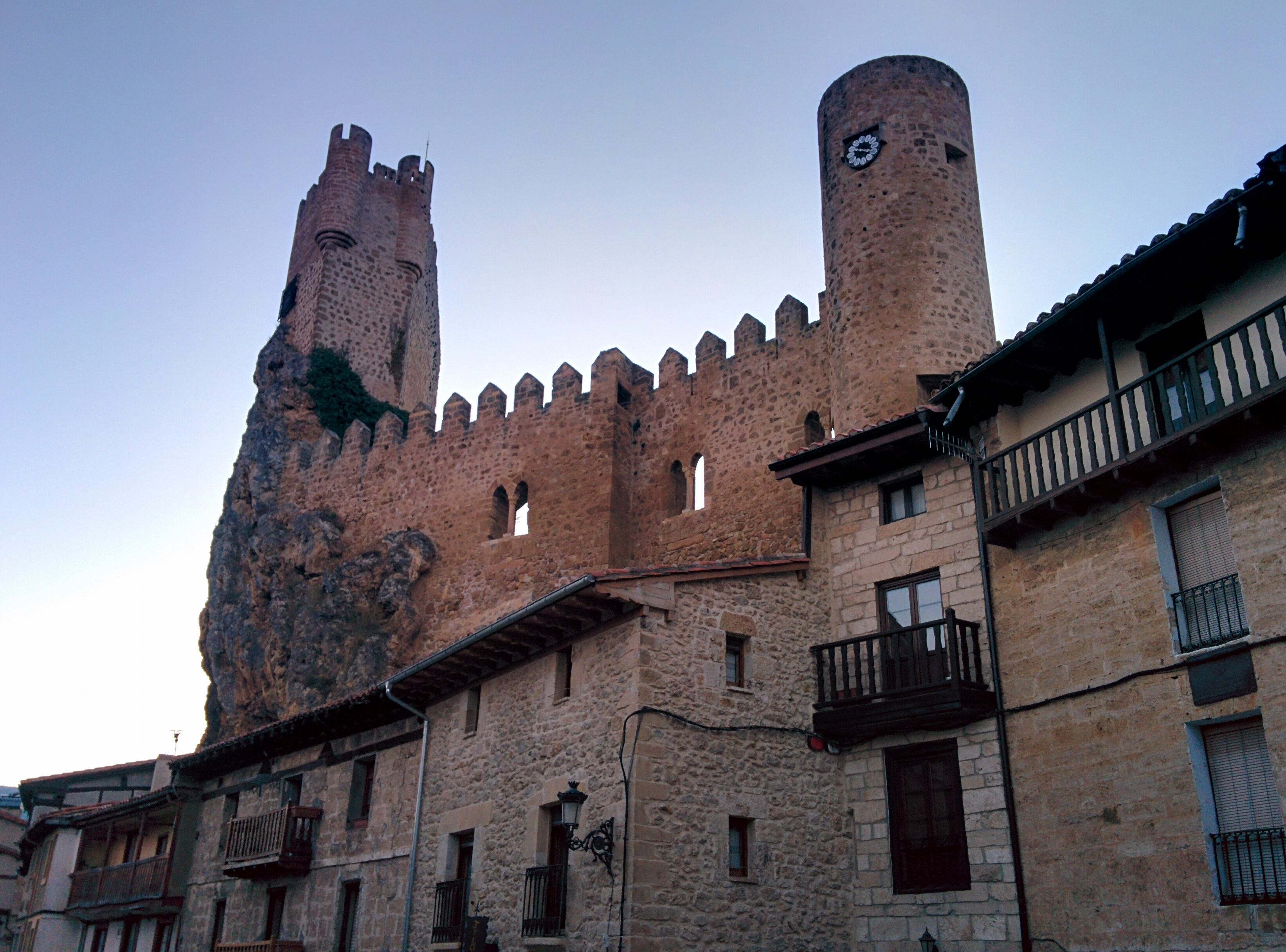 Castillo de Frías (Burgos, España) al atardecer.